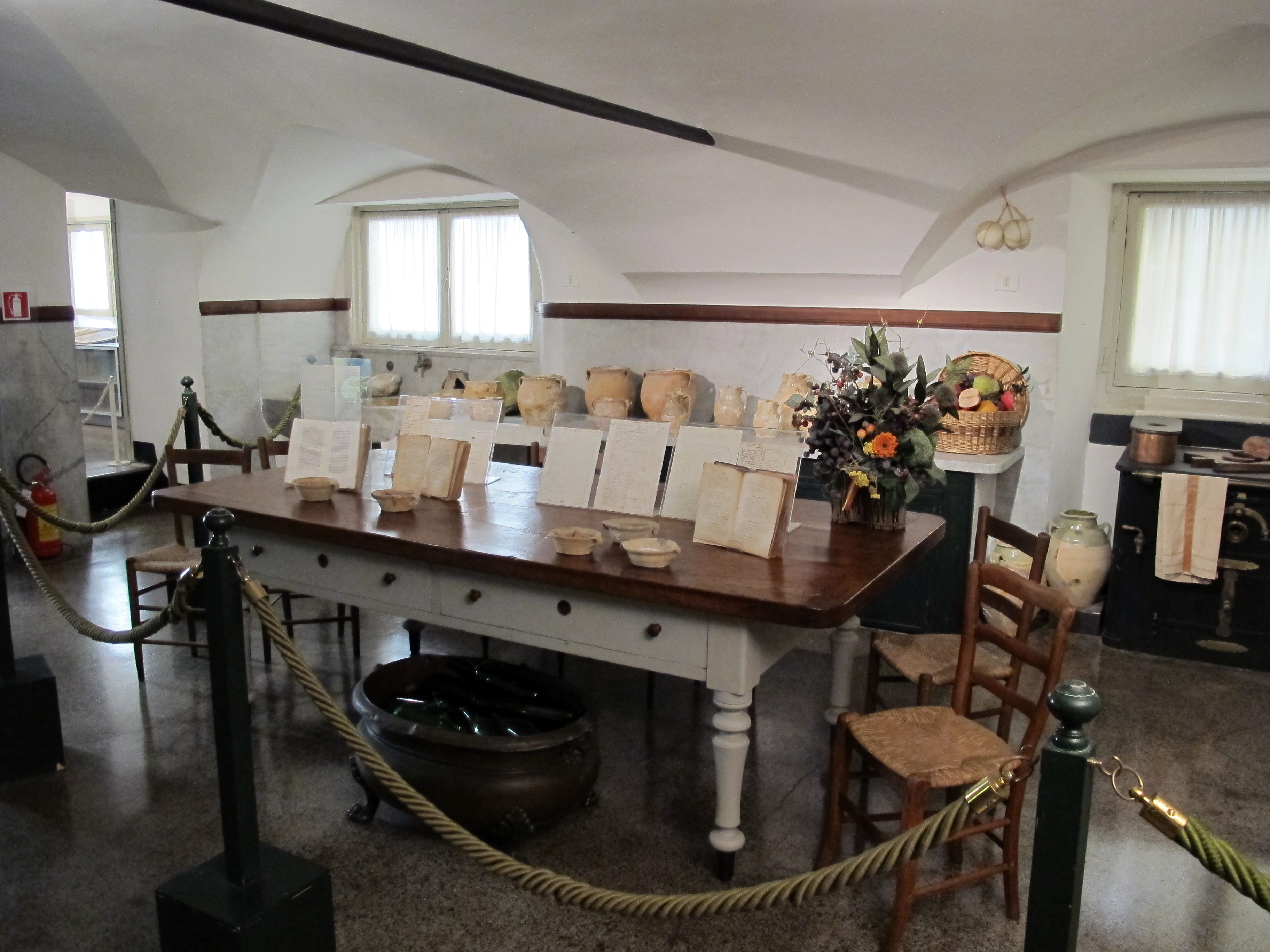 Palazzo Spinola in Pellicceria (Genova)